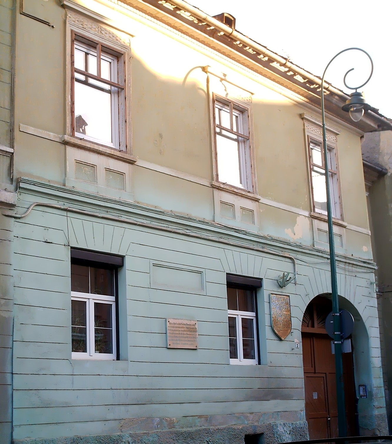 Casina Română from Braşov